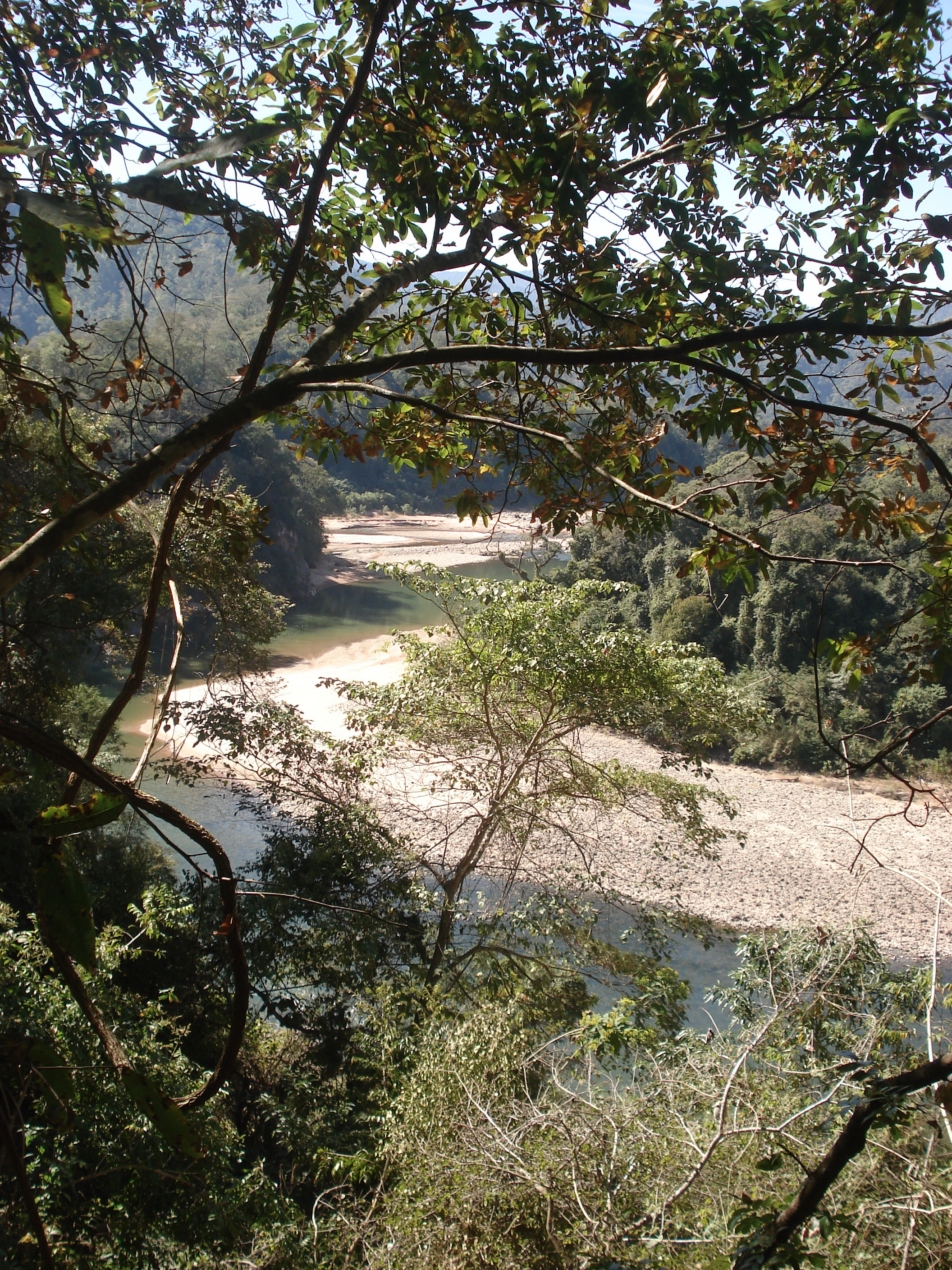 Confluencia de los ríos Tarija y Chiquiacá, al interior de la Reserva nacional de Flora y Fauna Tariquia. Limites provincias Gran Chaco y Arce.